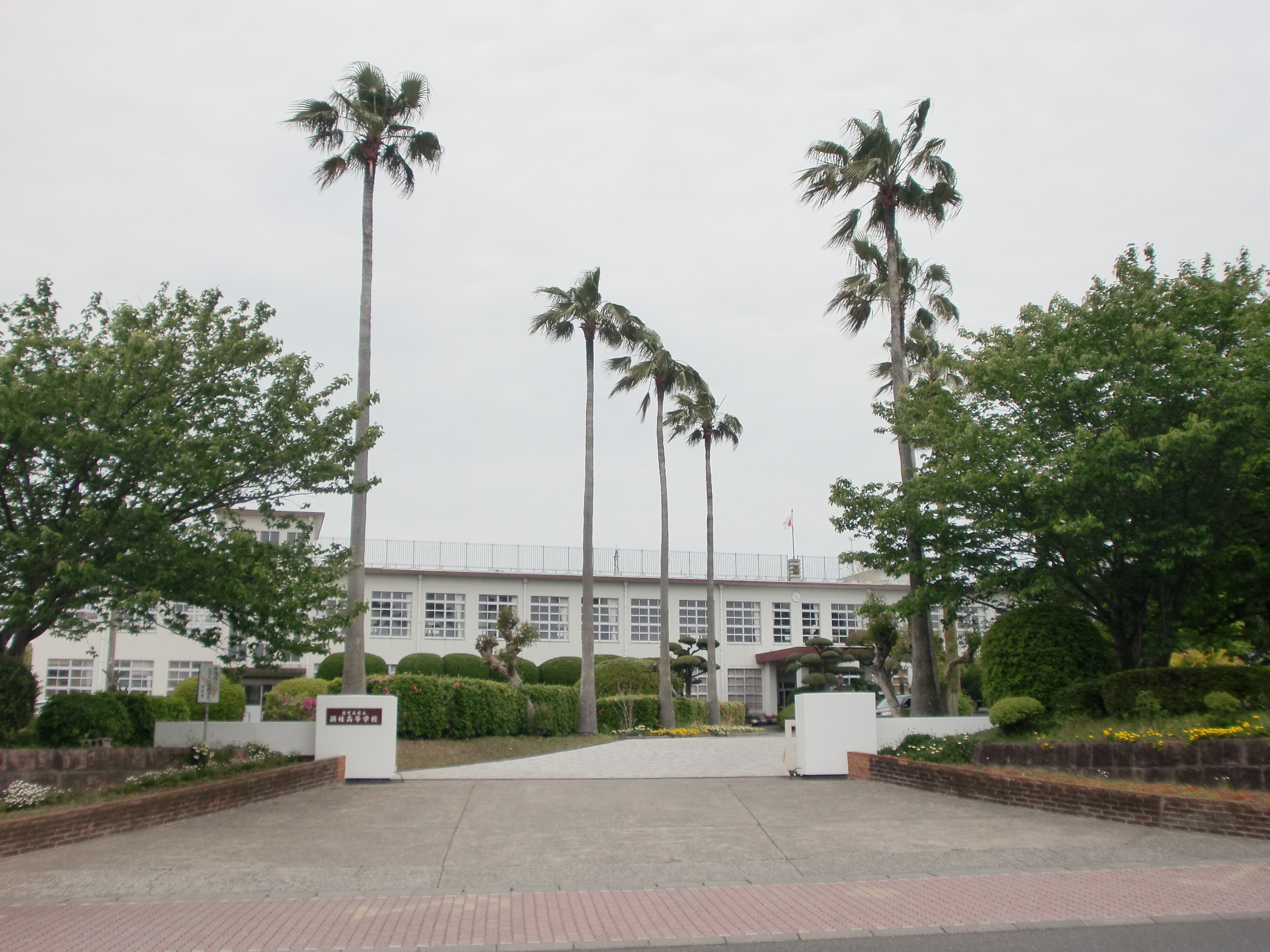 鹿児島県立頴娃高等学校の外観。